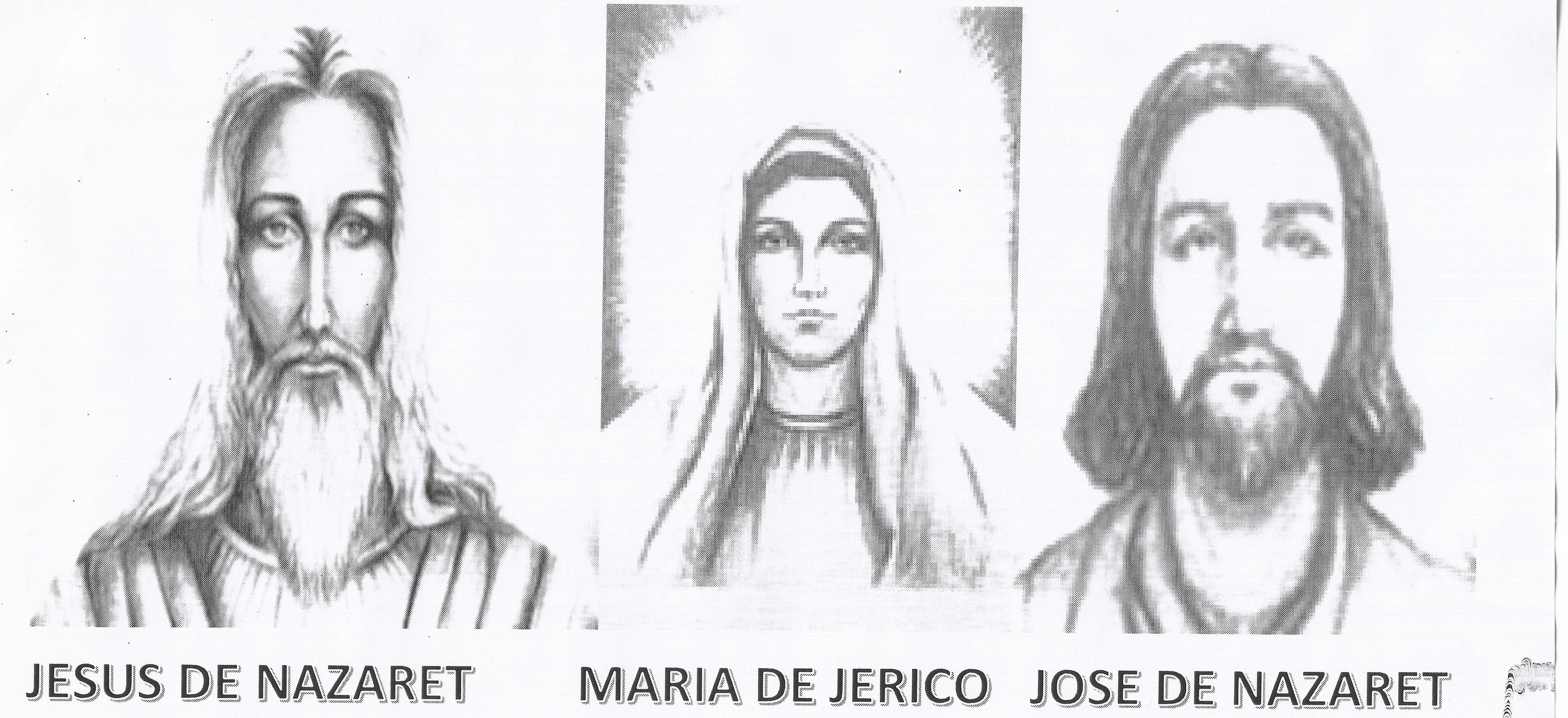 Redentores: JESÚS DE NAZARET , MARÍA DE JERICO, JOSÉ DE NAZARET